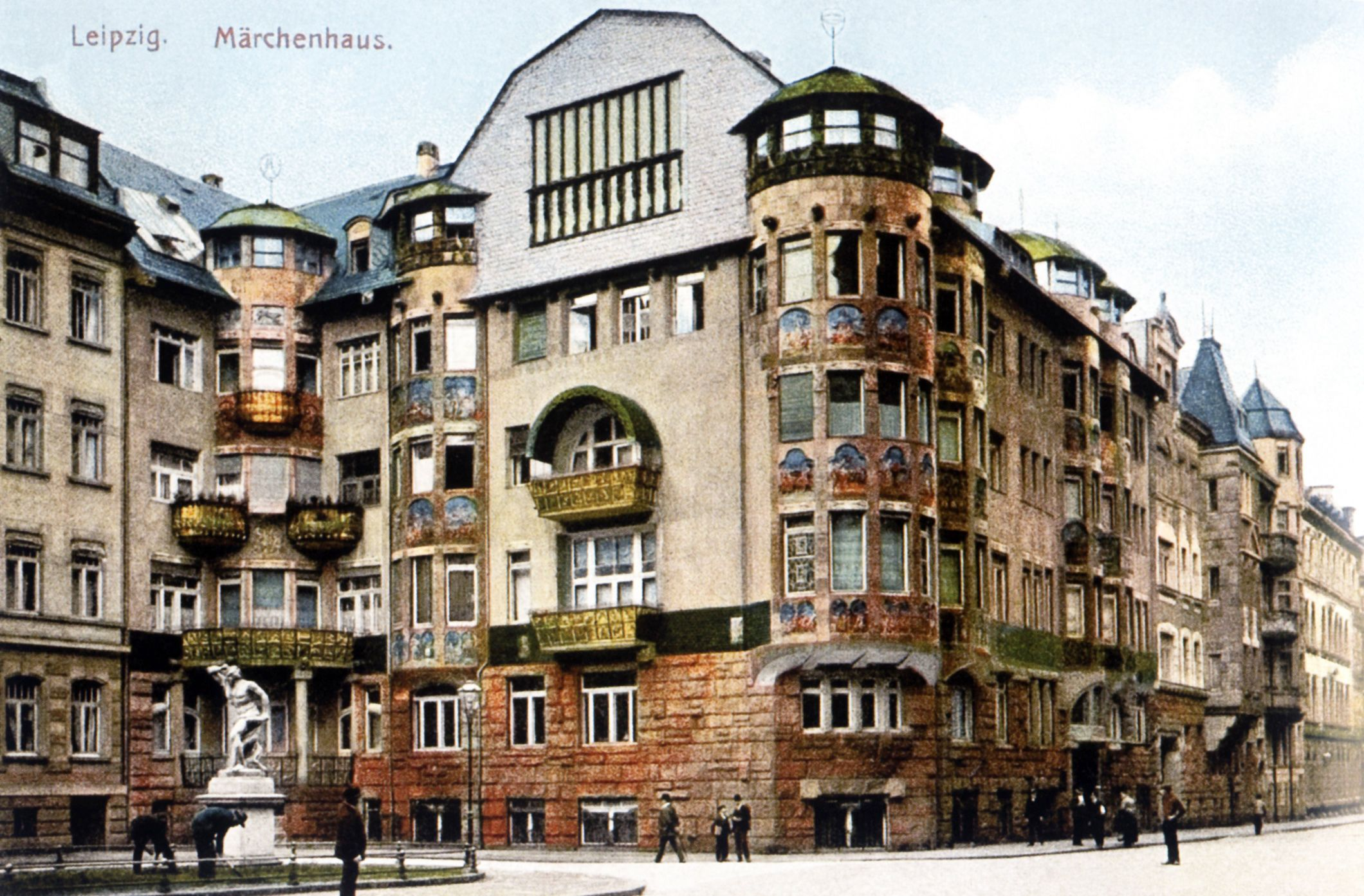 Leipzig, Platz am Künstlerhaus (seit 1922: Nikischplatz), so genanntes MärchenhausDas für Leipzig bedeutende Beispiel der Jugendstilarchitektur wurde 1906/1907 von dem Architekten Raymund Brachmann erbaut und am 4. Dezember 1943 zerstört.